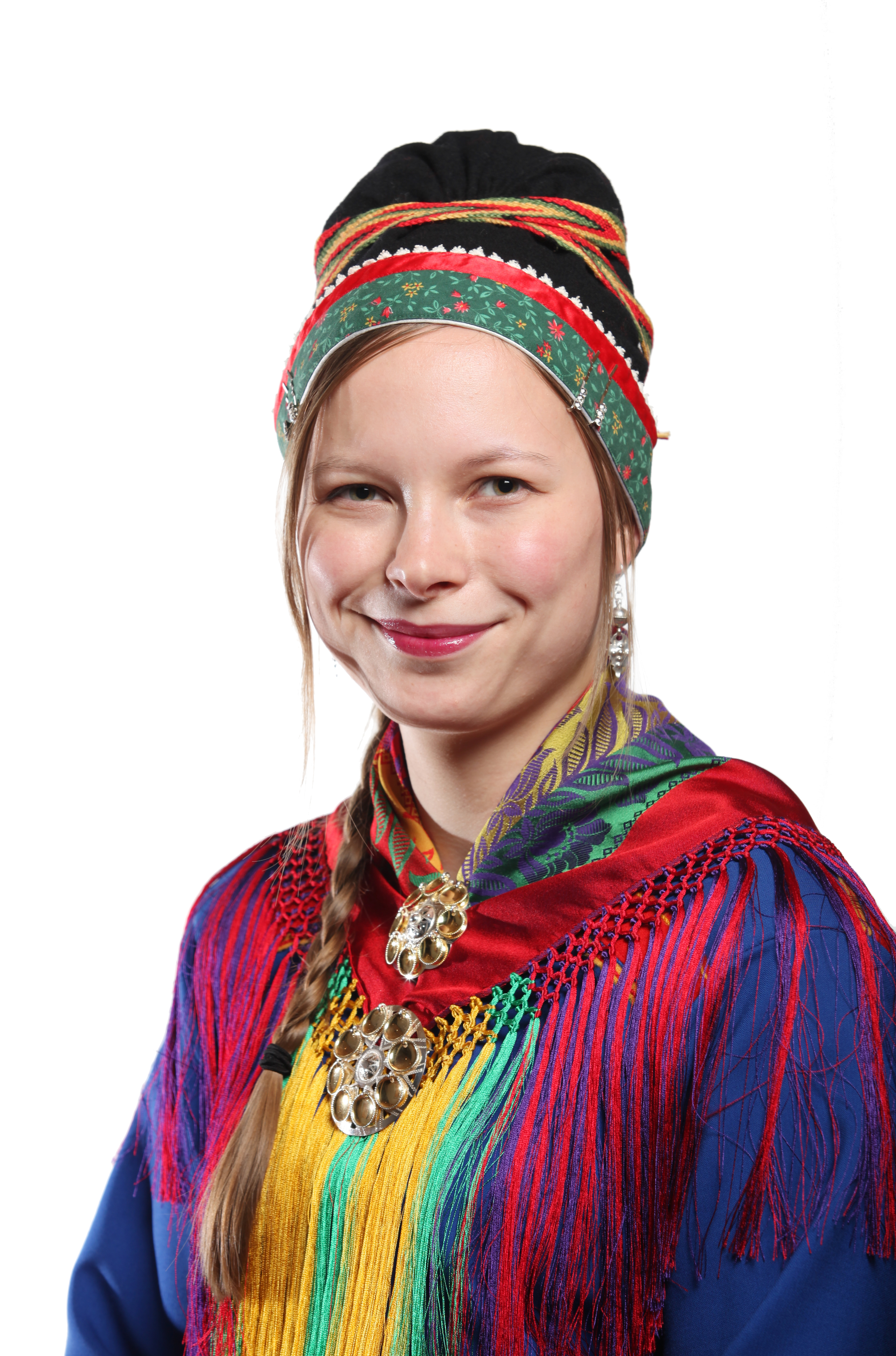 Medlem av oppvekst-, omsorg- og utdanningskomitéen og medlem av valgkomitéen. Foto: Kenneth Hætta / Sametinget.